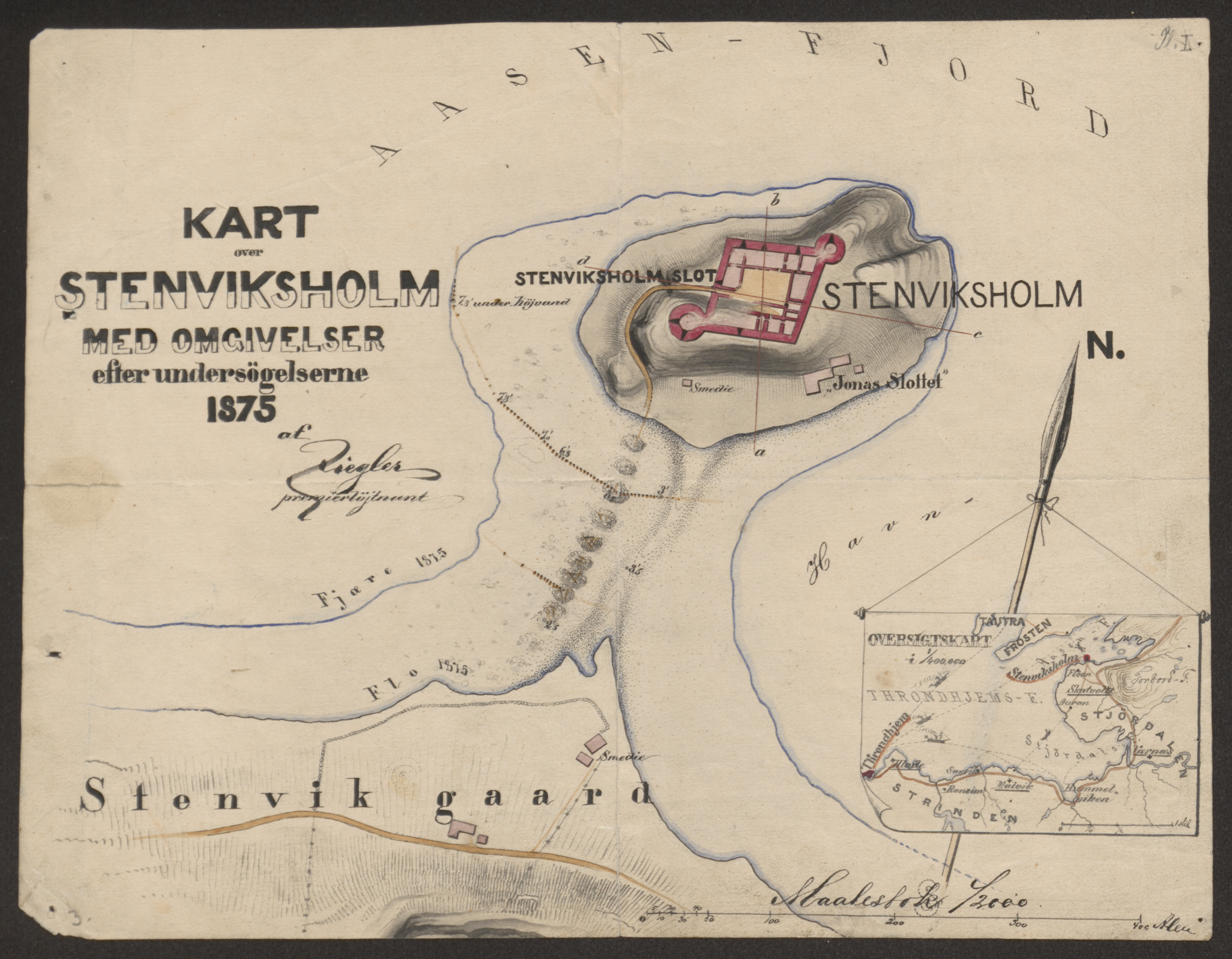 Bildet er hentet fra Riksantikvaren. Kart over Stenviksholm med omgivelser efter undersøgelsene 1875 Eier : Riksantikvaren Sted : Norway, Nord-Trøndelag, Stjørdal Emneord: FESTNINGER, KART, TEGNINGER (DOKUMENTASJON), PLANTEGNINGER, SITUASJONSPLANER Medium : "Tusj;Akvarell"